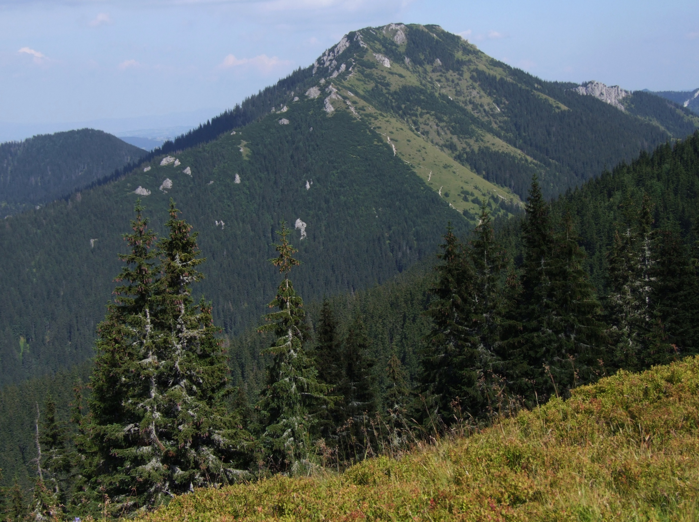 Parzątczak i Bobrowiec. Widok ze szlaku Przełęcz w Osobitej - Grześ